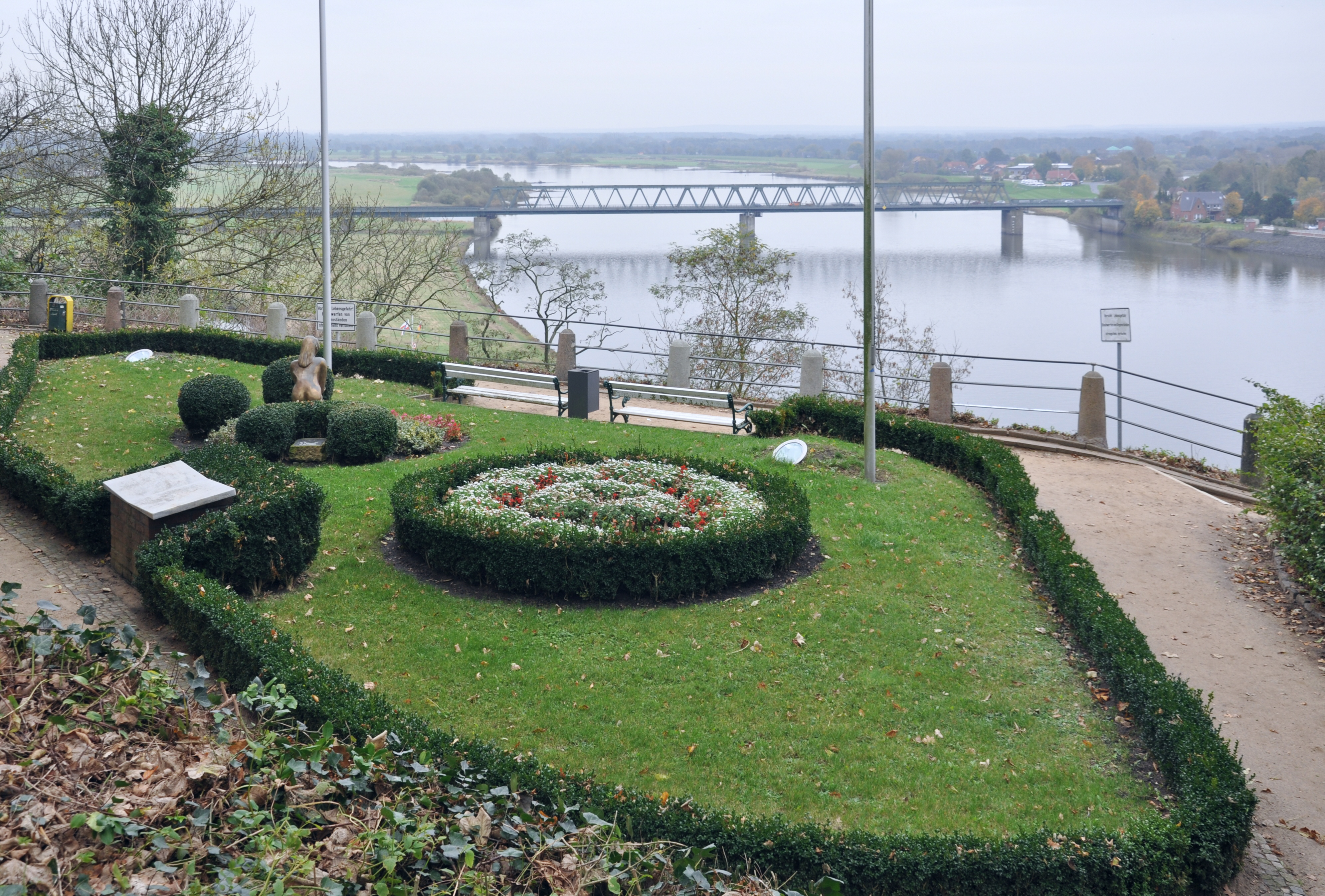 Edith Breckwoldt: Ich bin, Bronze, 1995, aufgestellt auf der Aussichtsterrasse beim Schloss („Askanierblick“) in Lauenburg/Elbe